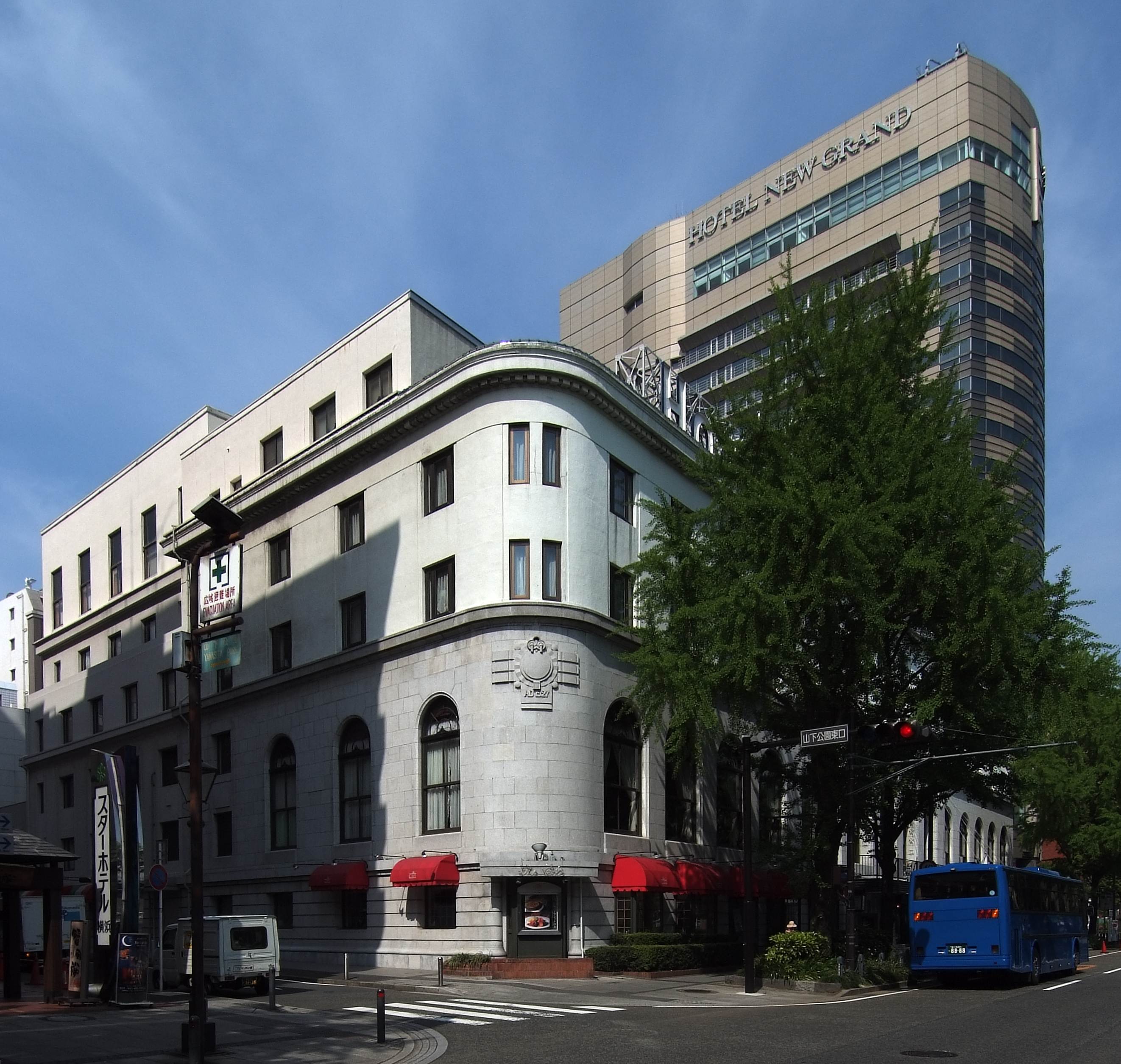 Hotel New Grand at Naka-ku Yokohama Kanagawa Japan, design by Jin Watanabe in 1927.